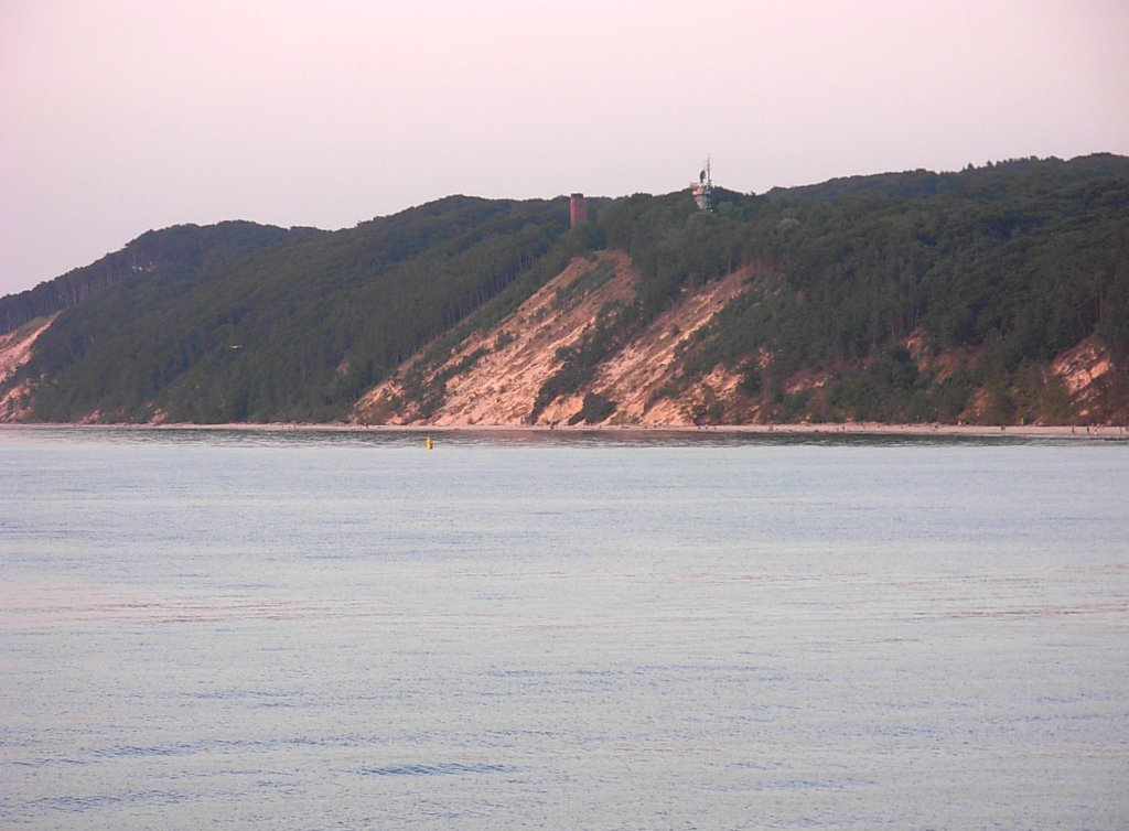 Kawcza Góra w Wolińskim Parku Narodowym